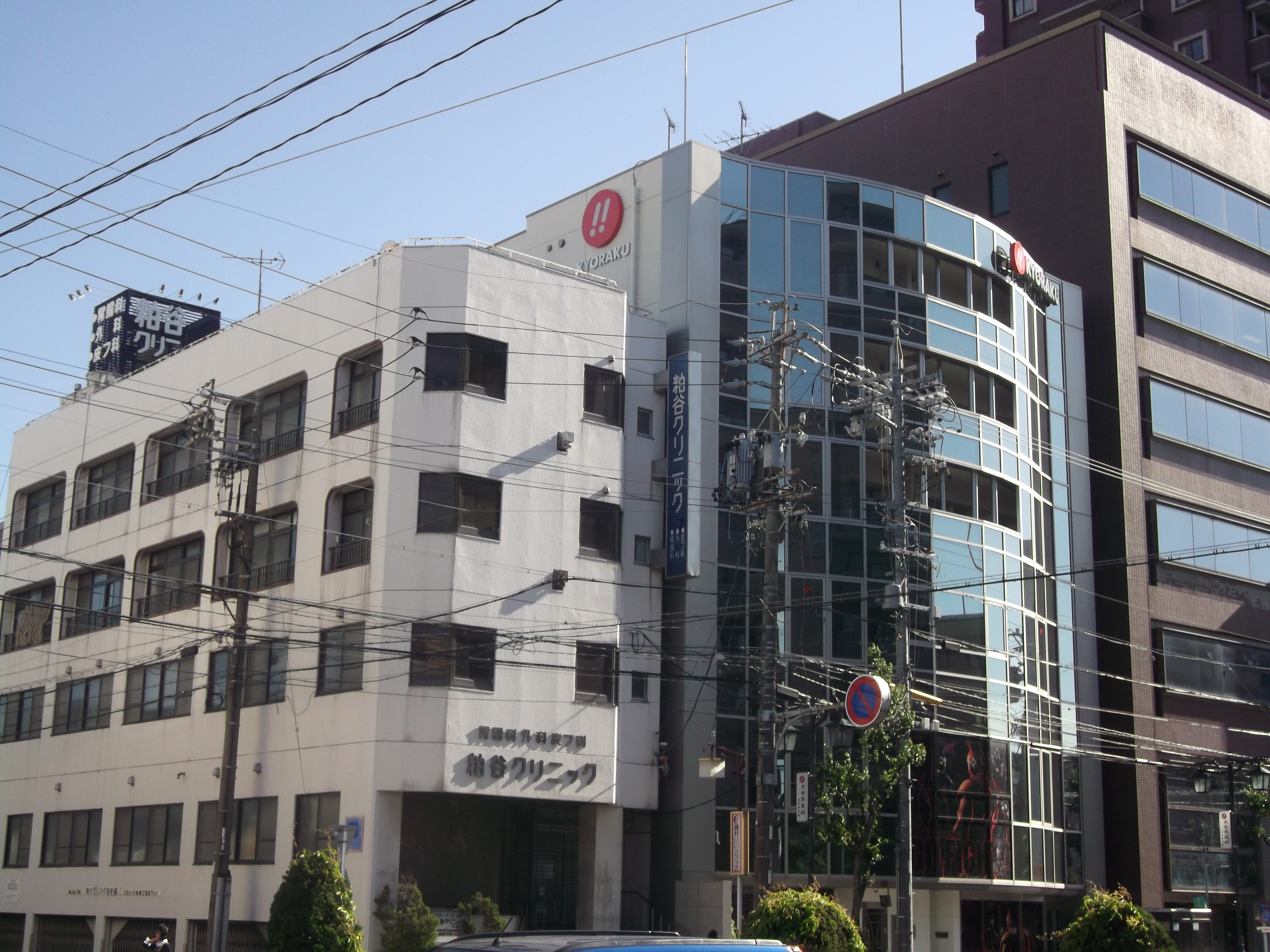 名古屋市瑞穂区の京楽産業名古屋支店ビルを北側公道東側から写す